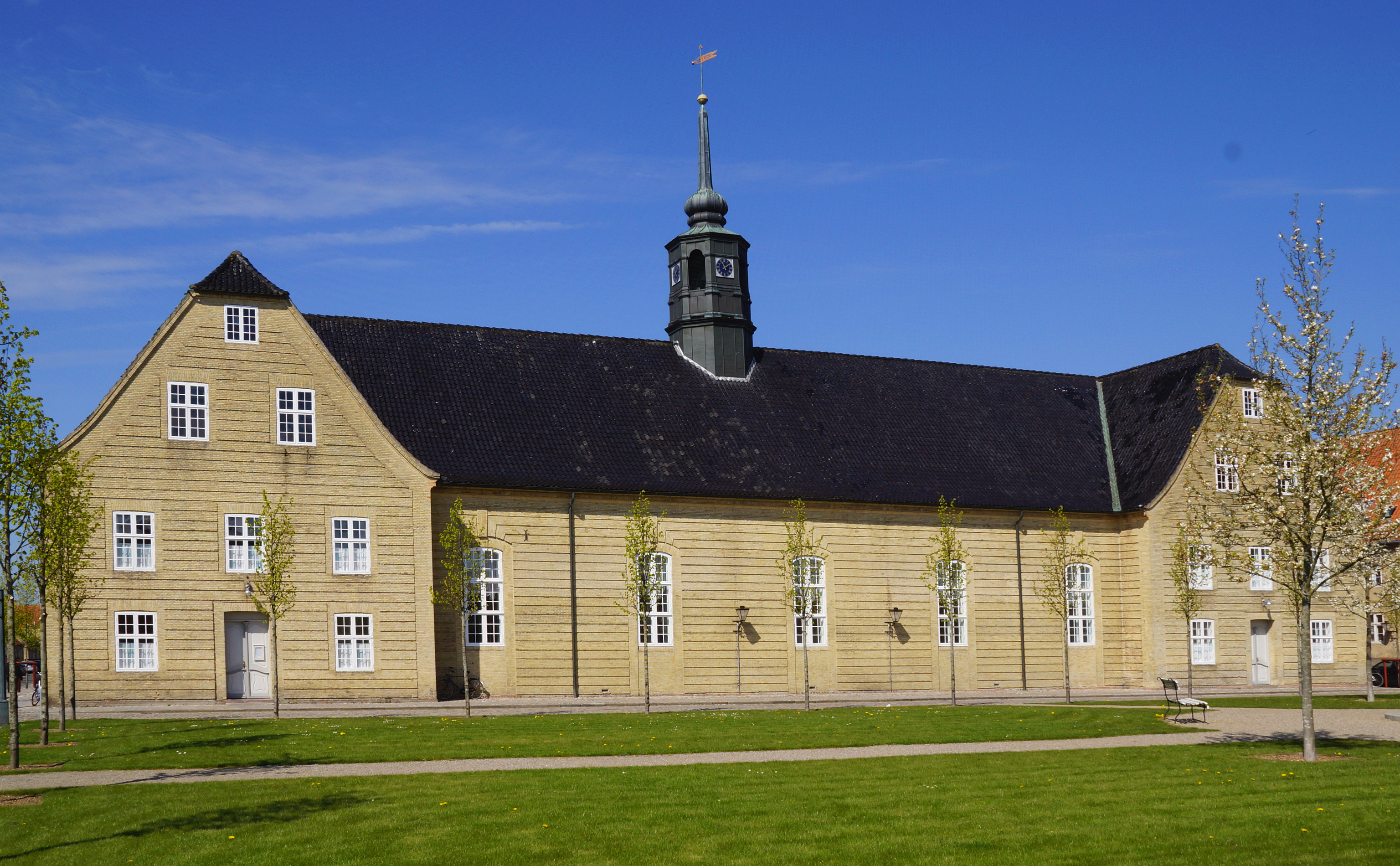 "Brødremenighedens Kirke", die Kirche der Herrnhuter Brüdergemeine am Brødremenighedens Kirkeplads in Christiansfeld geht auf 1777 zurück - Foto Wolfgang Pehlemann DSC 3518